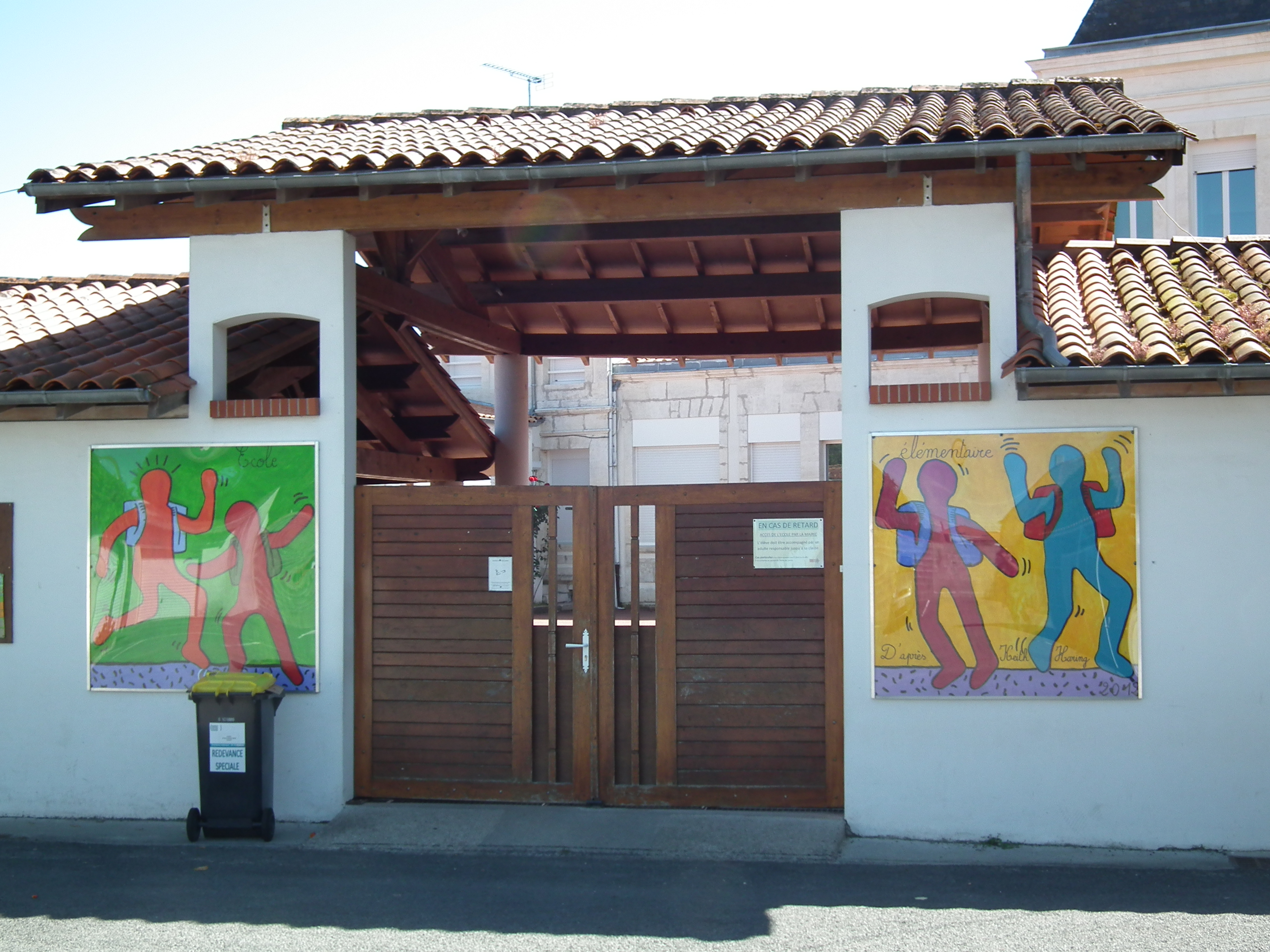 Ecole élementaire d'Etaules